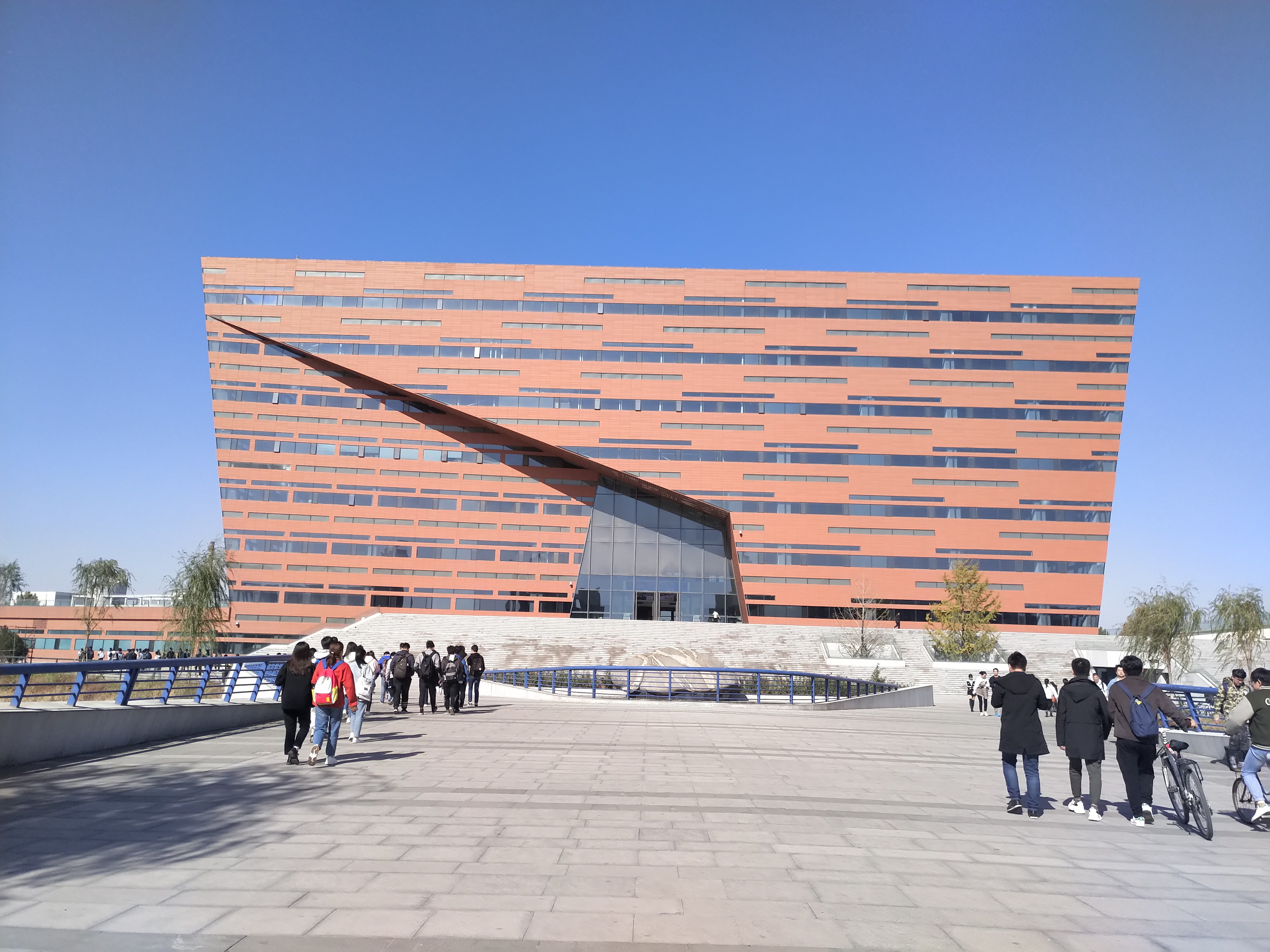 河北工业大学北辰校区图书馆